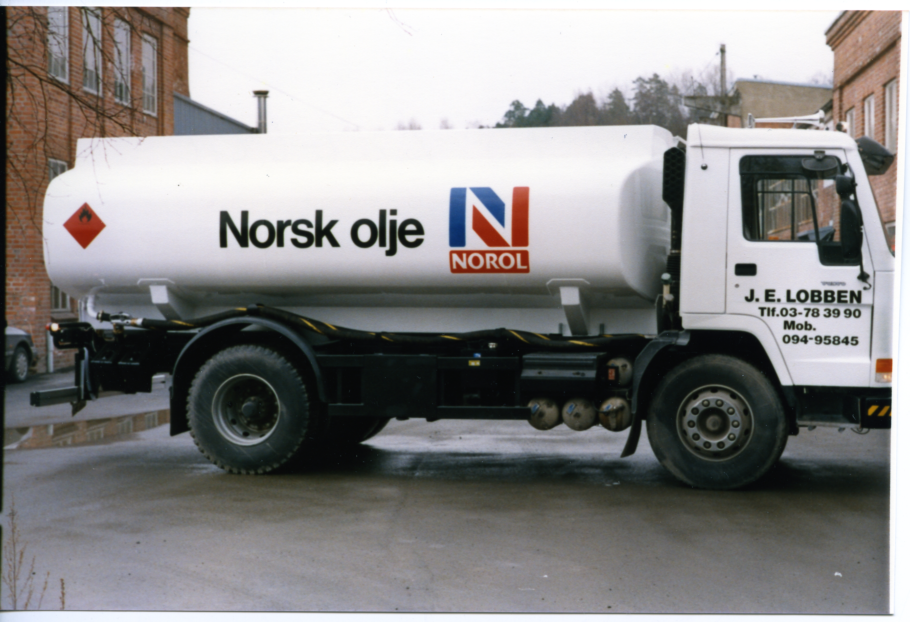 Bildet er hentet fra Arkivverket. J.E. Lobben Arkivinstitusjon : Statsarkivet i Stavanger Arkivnavn : Pa 1761 - Statoil Fuel and Retail Norge AS Sted : Norge, Ukjent, Ukjent, Emneord: Olje, Petroleum, Tankbil Avbildet